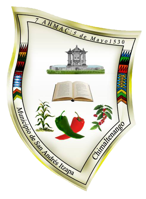 Escudo actual del Municipio de San Andrés Itzapa, año 2015.